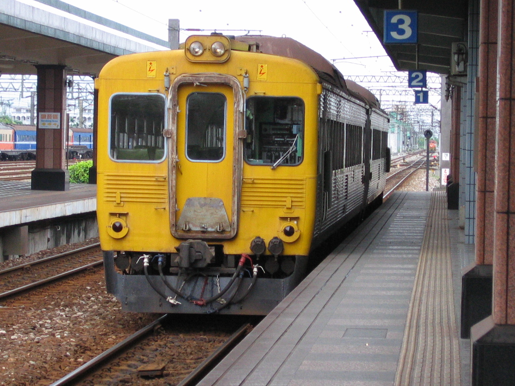 中文（台灣）: 臺灣鐵路管理局DR2700型柴油車停靠花蓮車站。